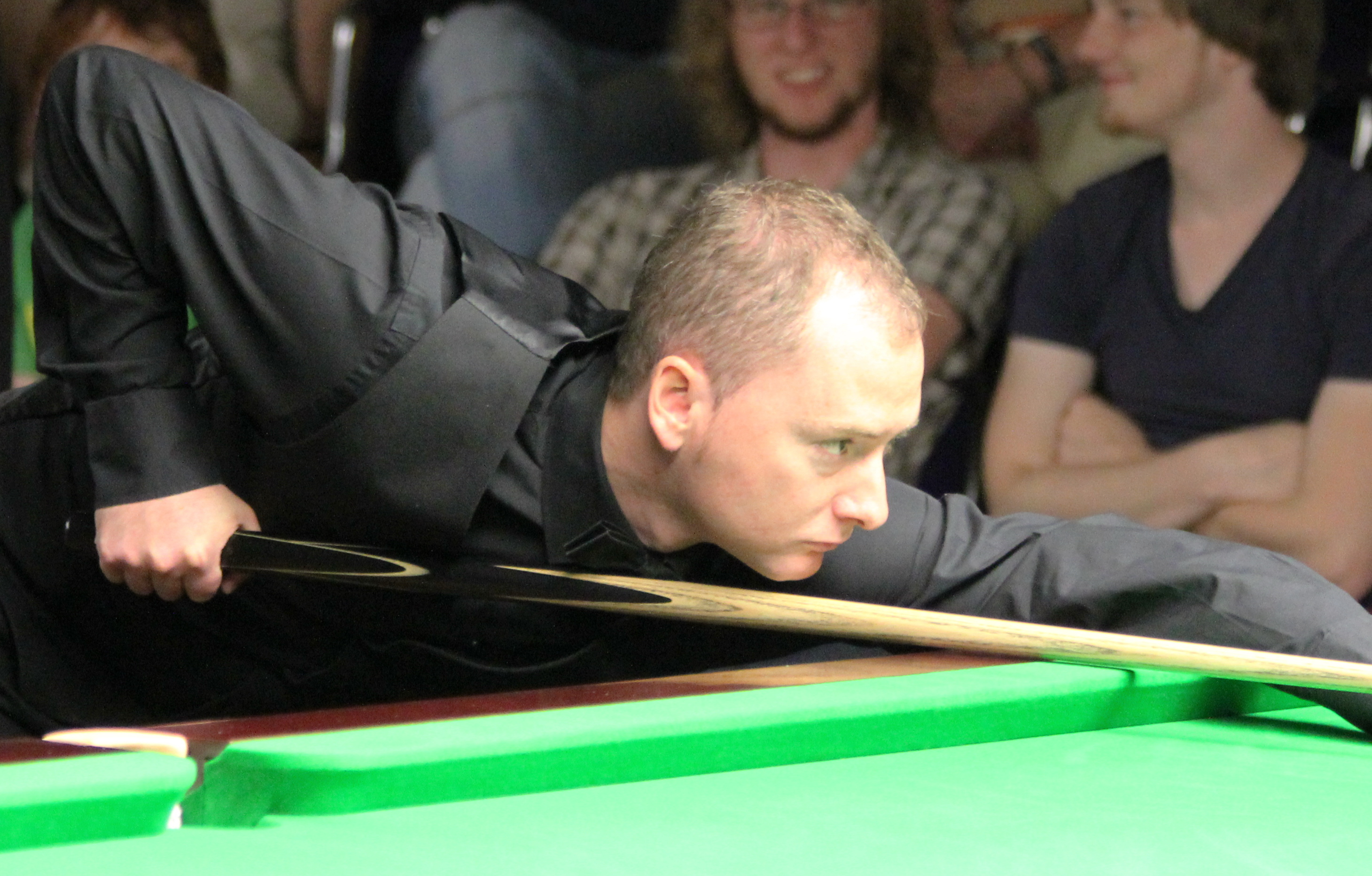 Graeme Dott beim Paul Hunter Classic 2012